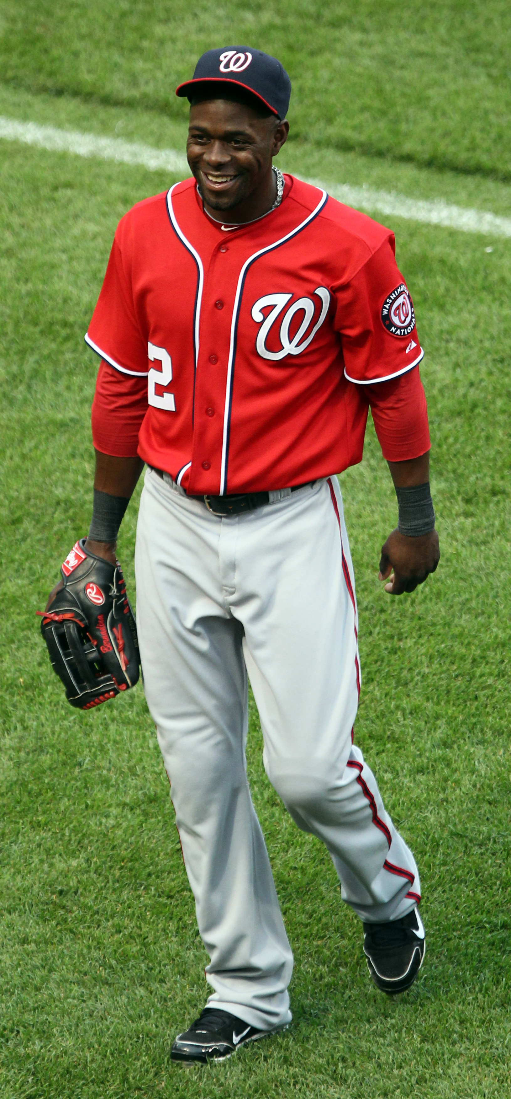 Roger Bernadina